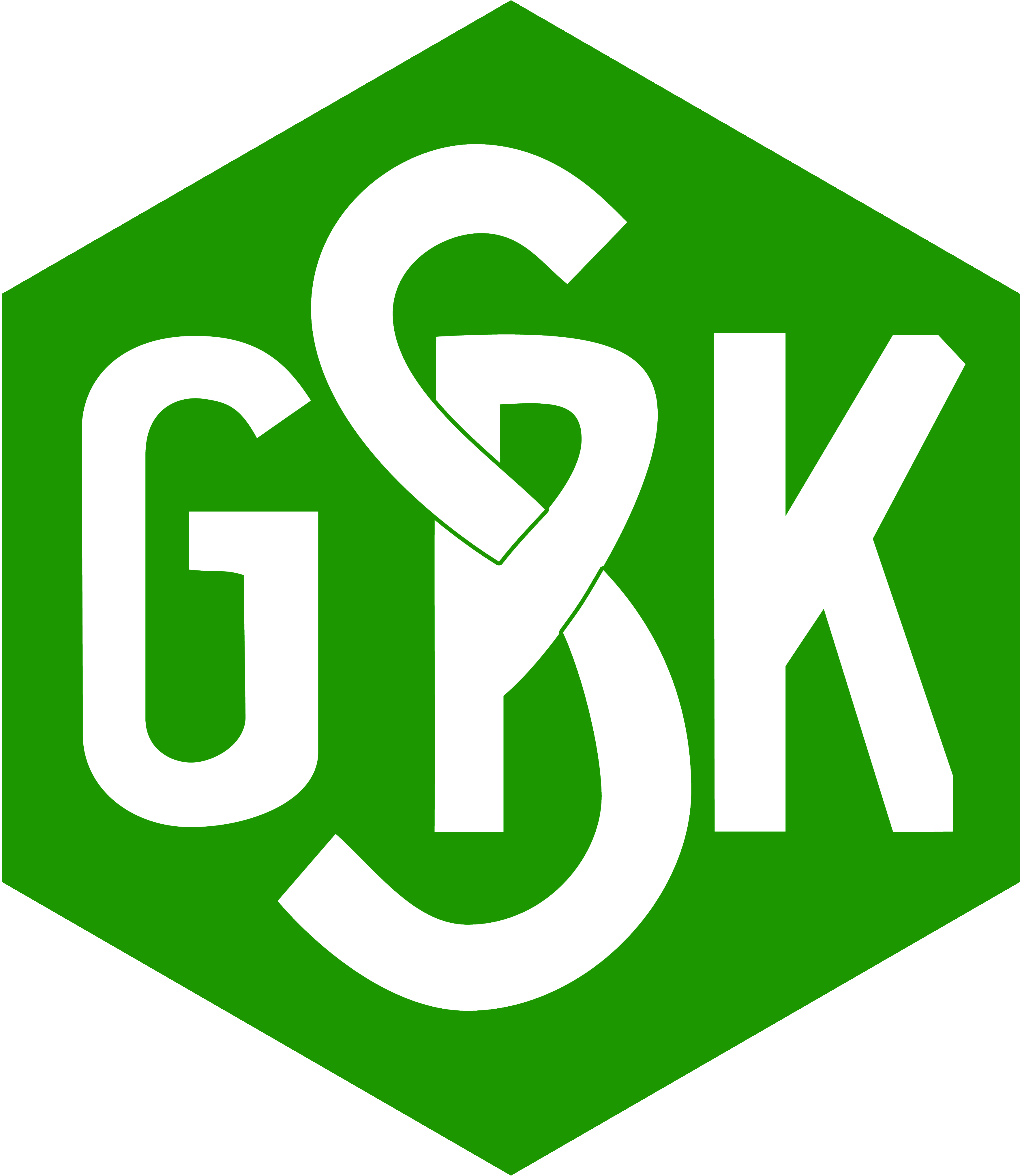 Logo des Grazer Sportklub Straßenbahn